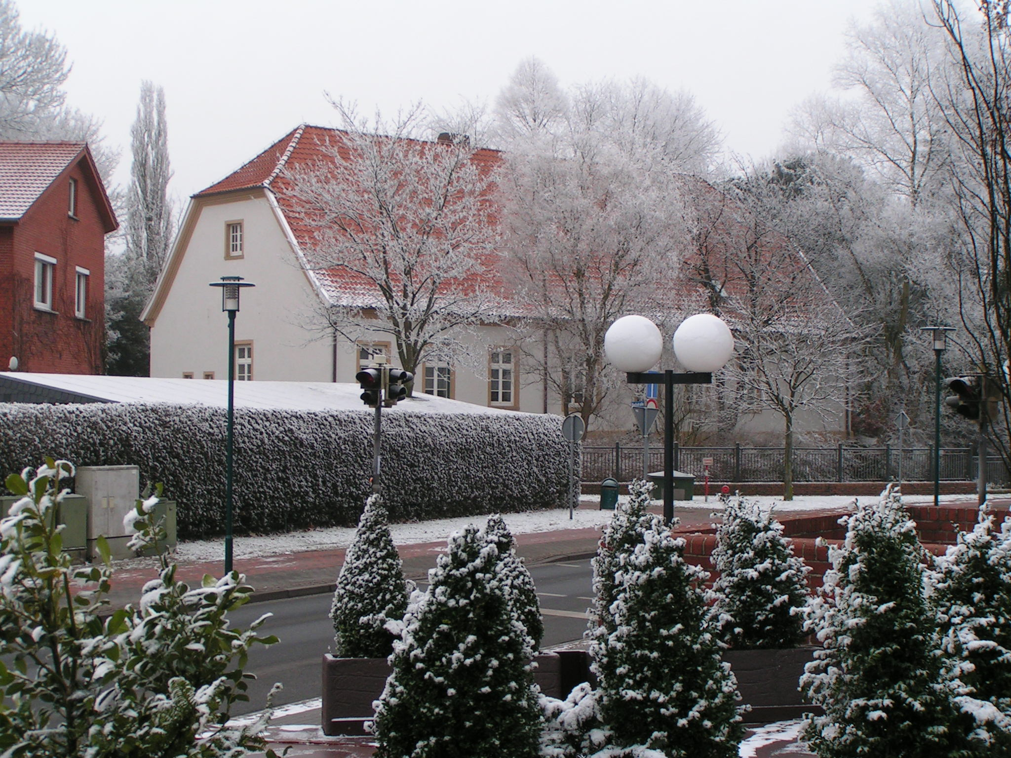 Pastorat der katholischen Pfarrgemeinde St. Gertrud auf einer Insel, die von einem Wassergraben umgebenen ist, der unter Landschaftsschutz steht. In der Bildmitte ist die Vogtstraße, im Vordergrund der zugedeckte Rathausbrunnen zu sehen.